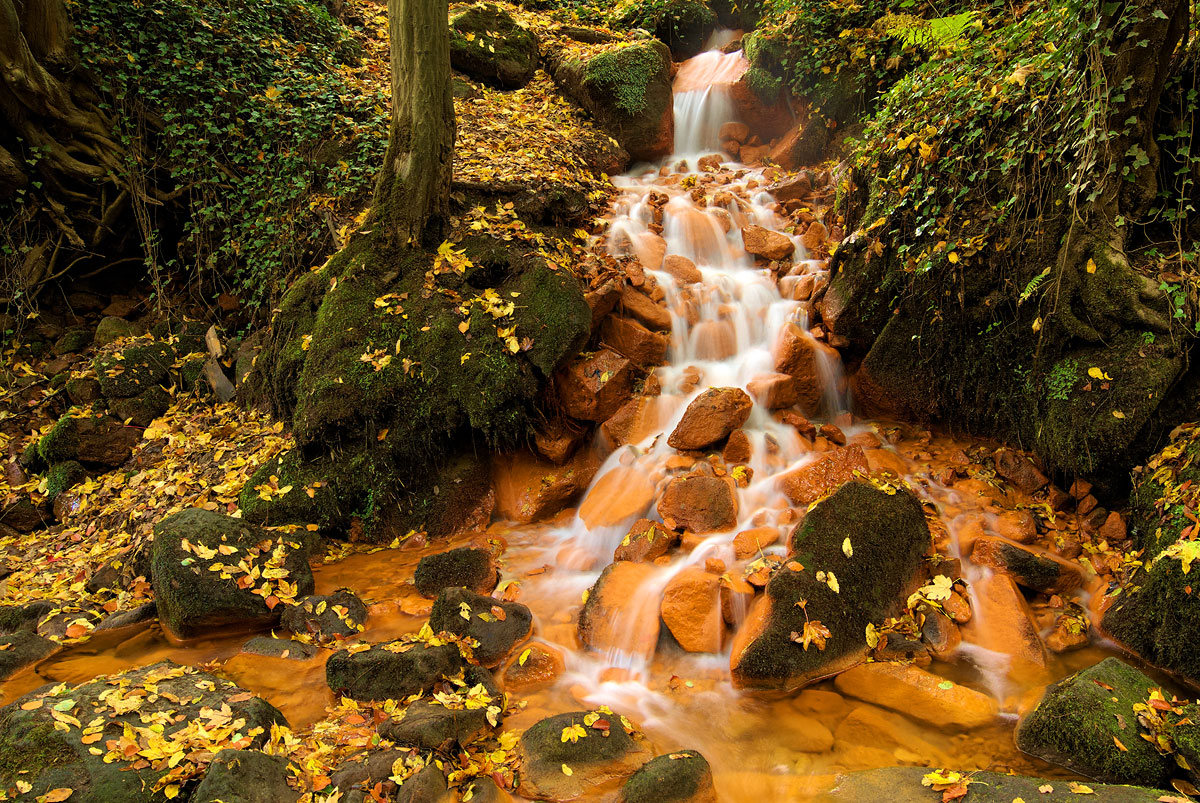 Železitý pramen vlévající se na dolním toku Suché Kamnice, poblíž ústí do řeky Labe